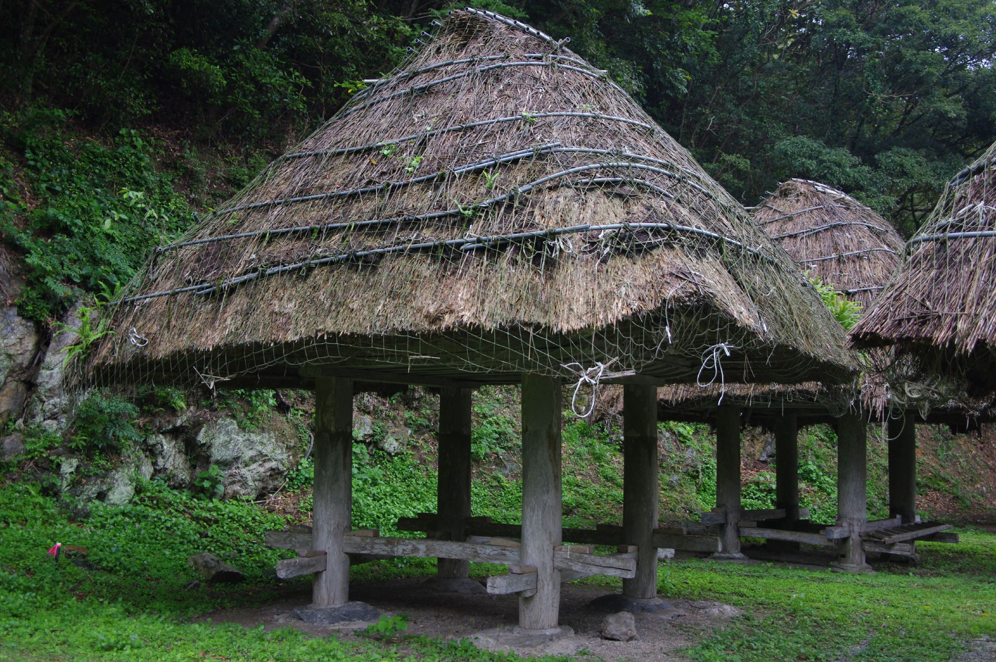 奄美大島大和村、大和浜の群倉（ぼれぐら、穀物倉庫の集まり）